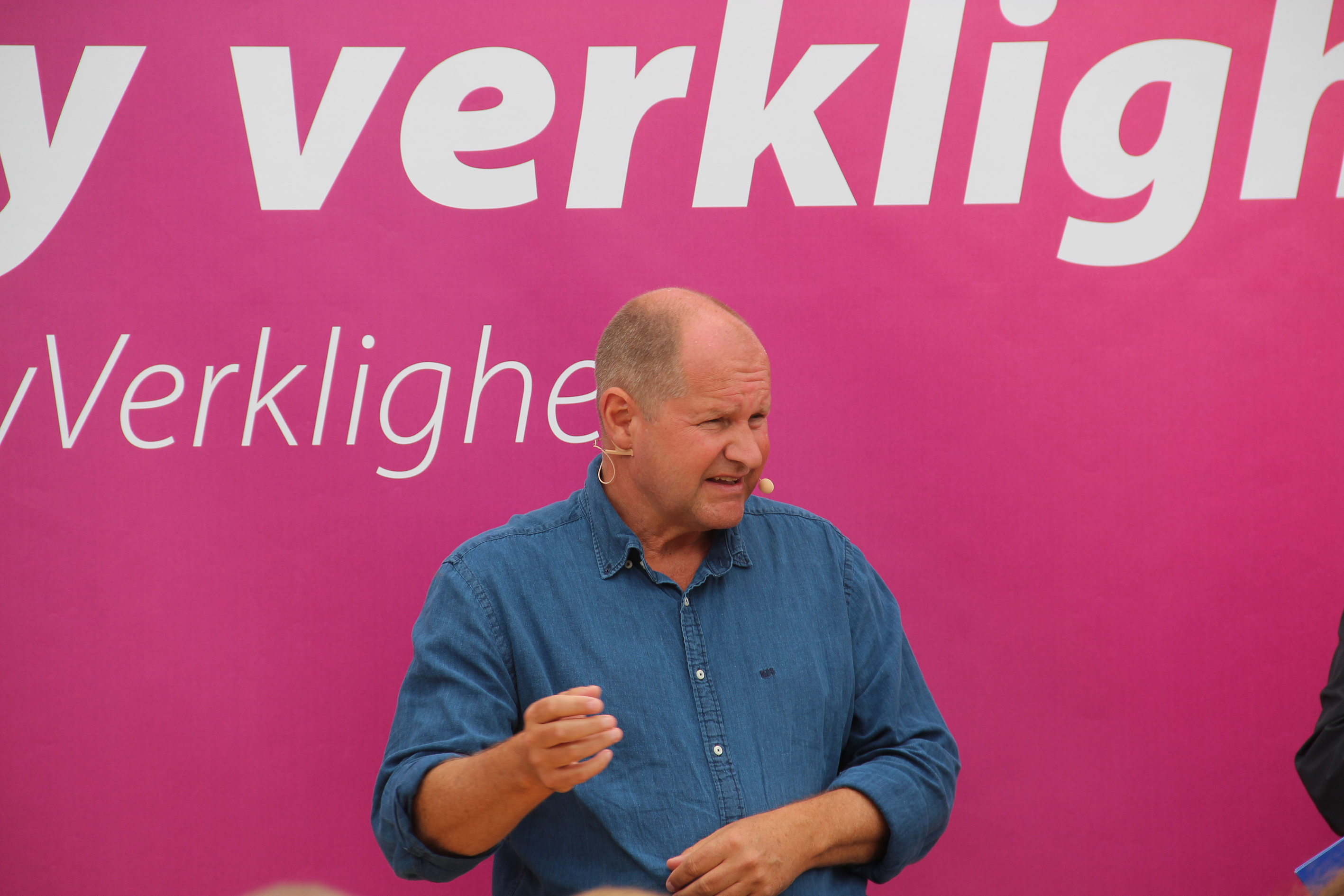 Dan Eliasson intervjuas av Claes Elfsberg under Almedalsveckan 2016.